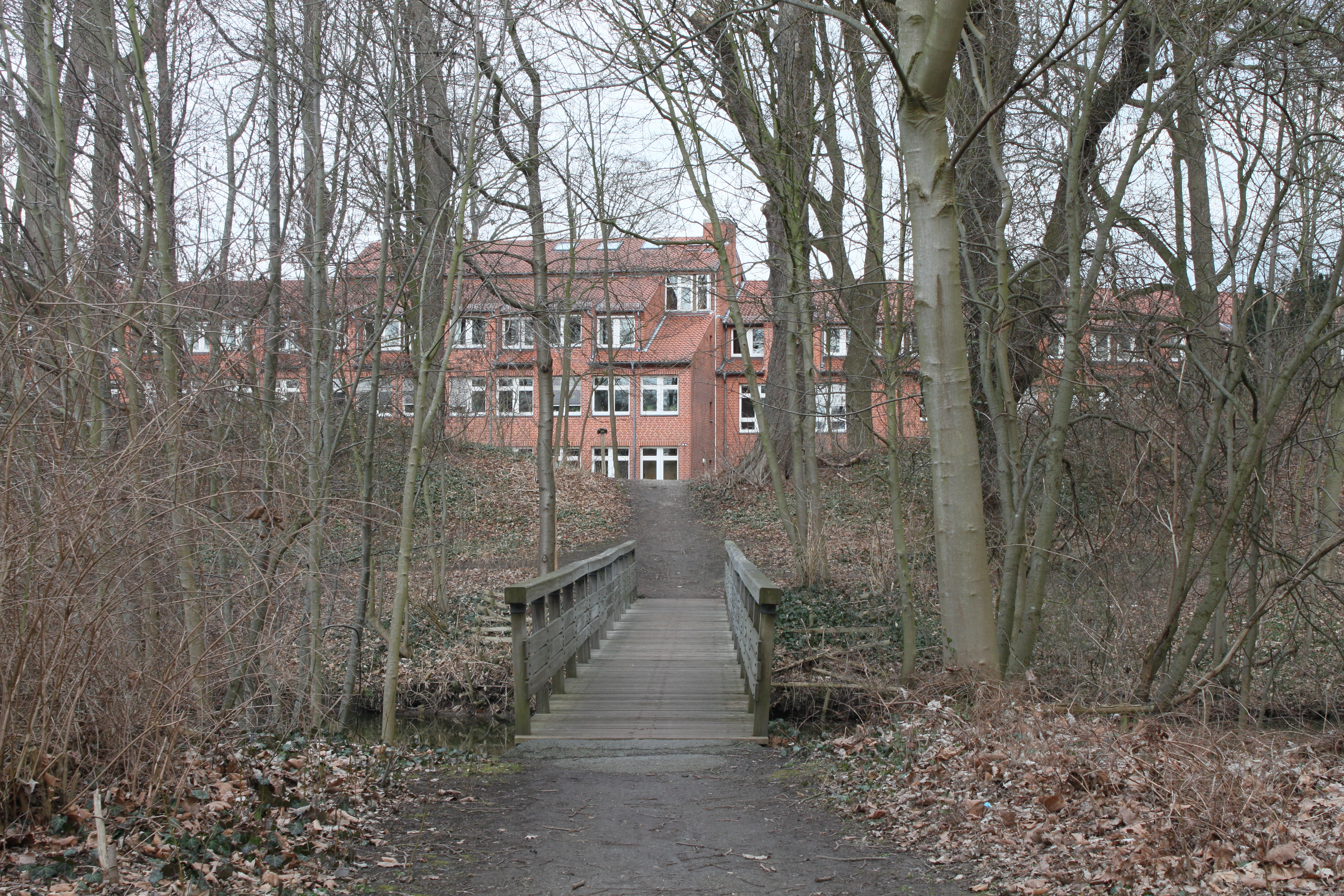 Syke, Landkreis Diepholz, Niedersachsen, Deutschland